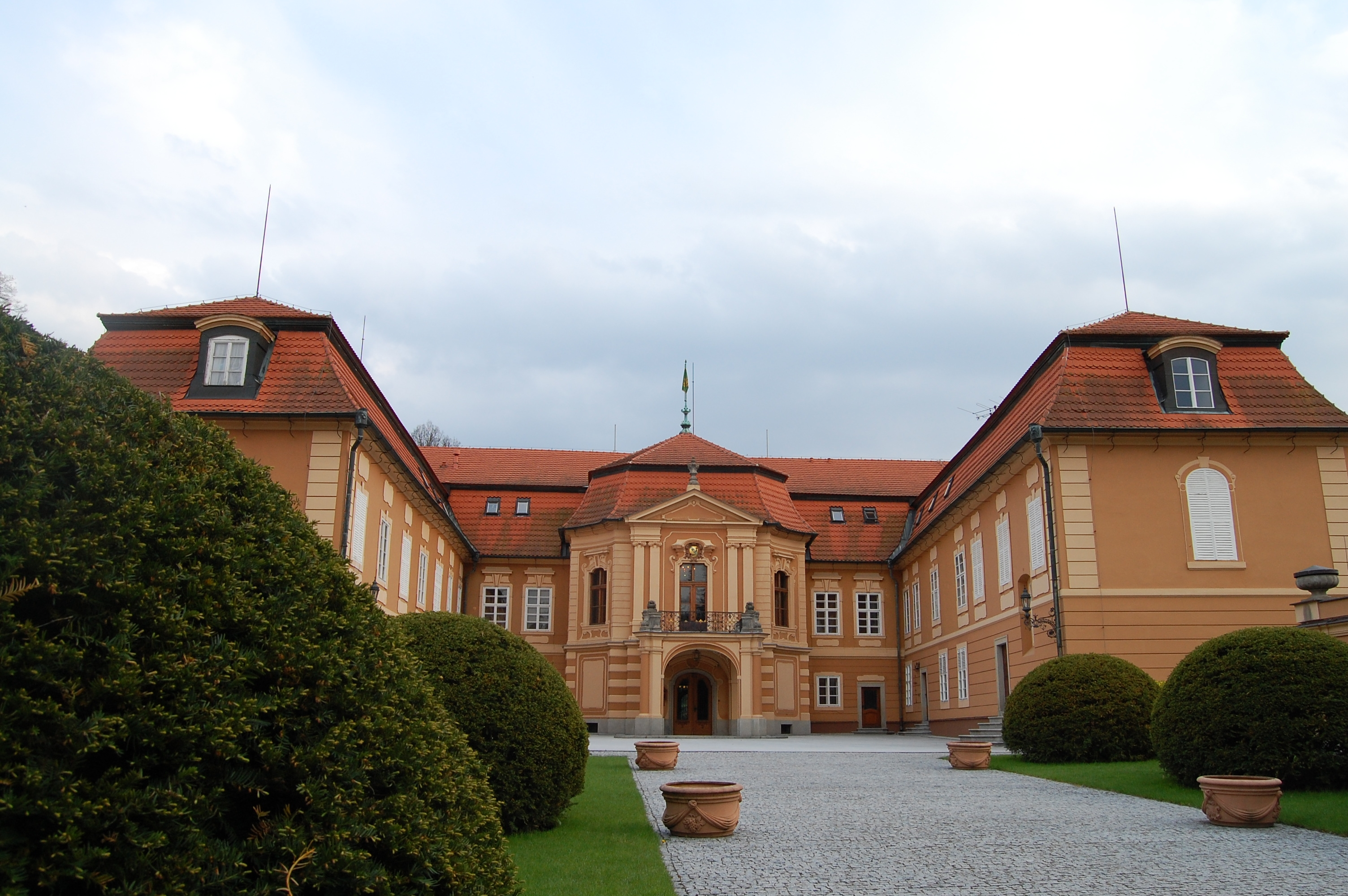 Zámek Štiřín, Štiřín 711